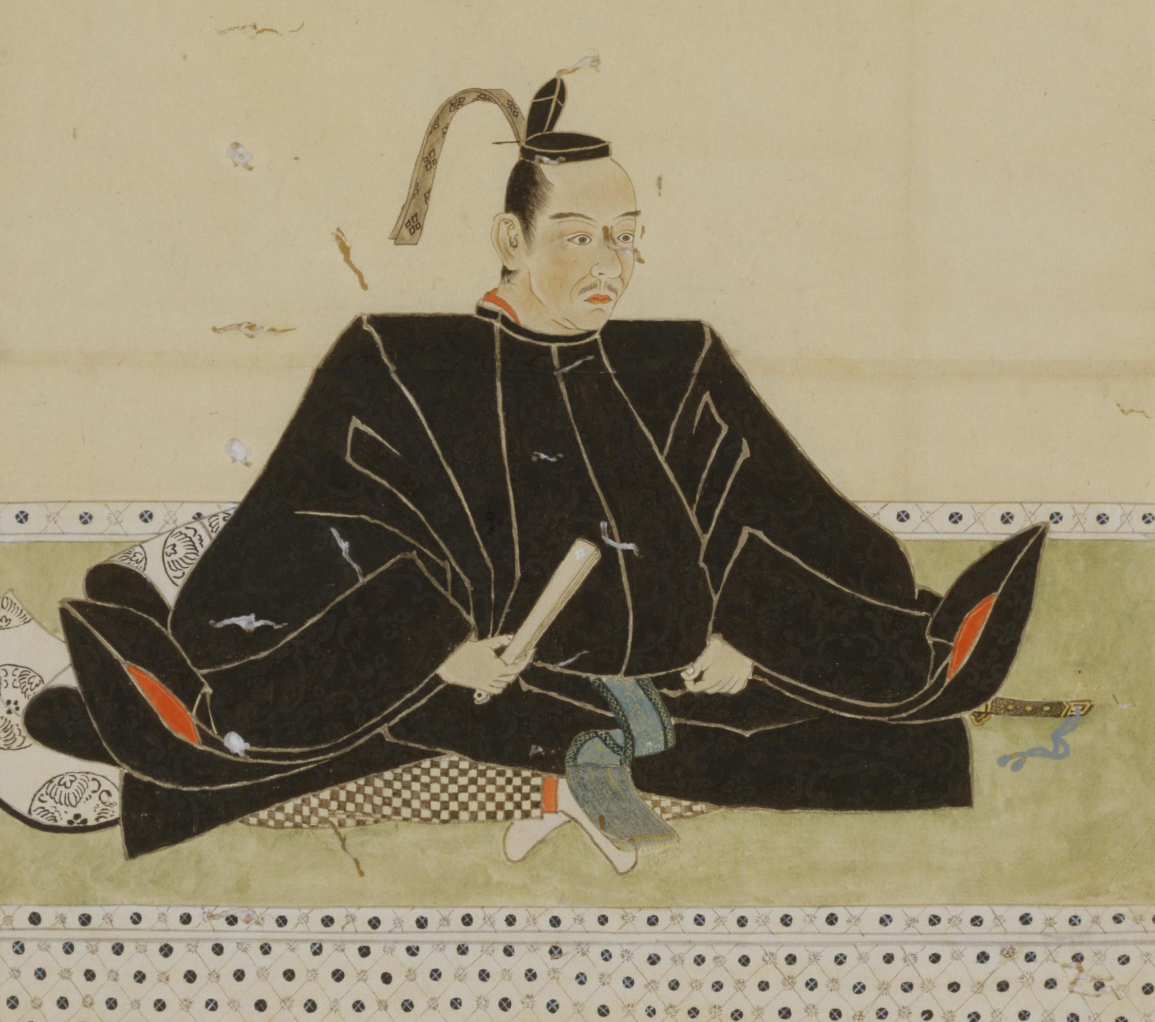 生駒正俊の肖像。